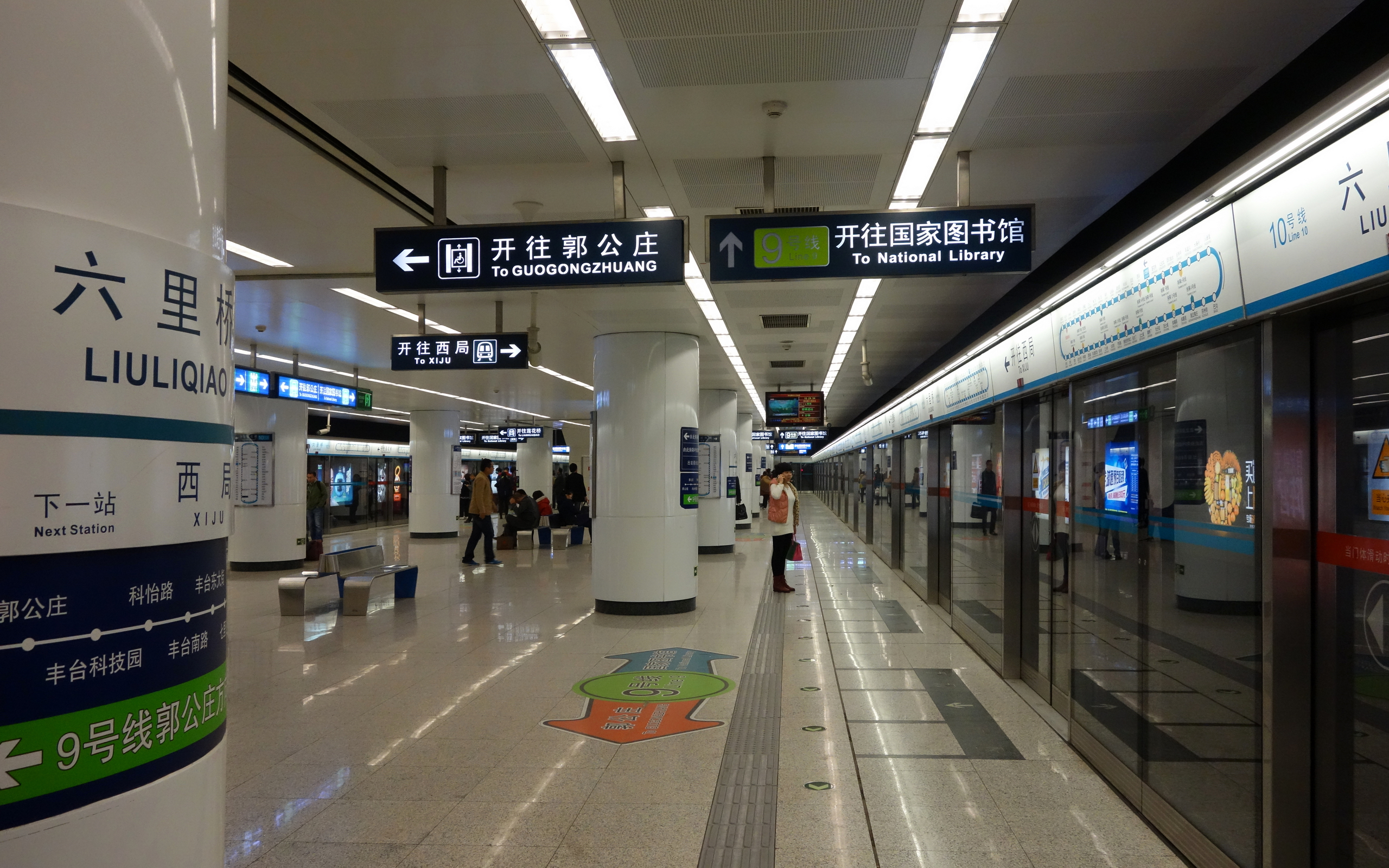 北京地铁10号线岛式站台